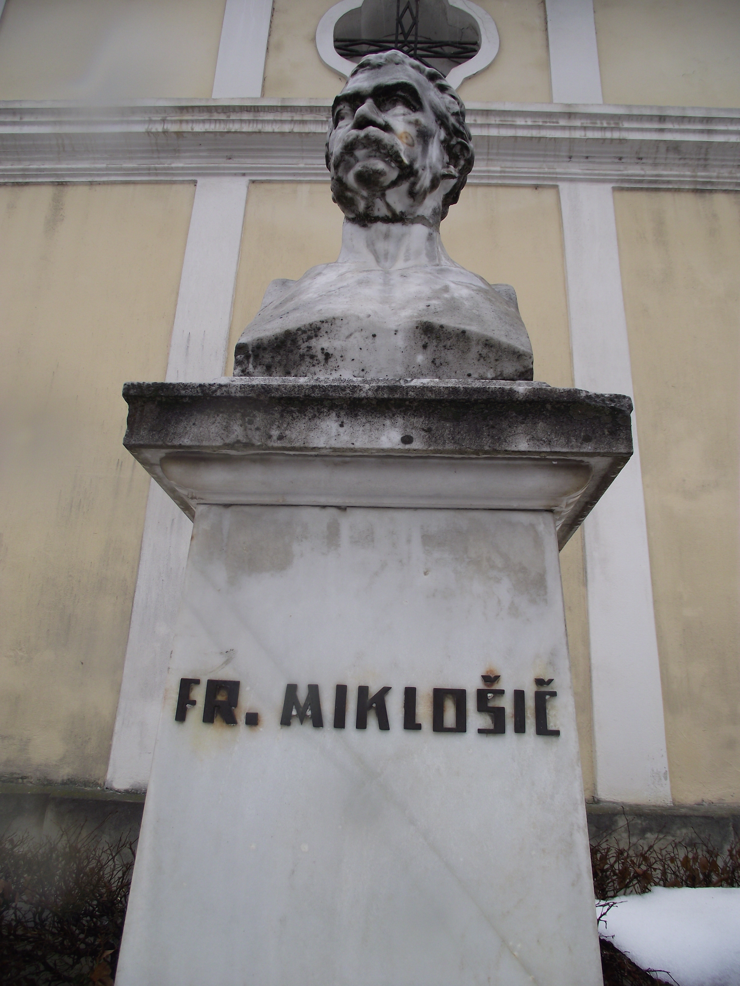 Doprsni kip Frana Miklošiča, postavljeno leta 1926, avtor Alojz Vodnik.